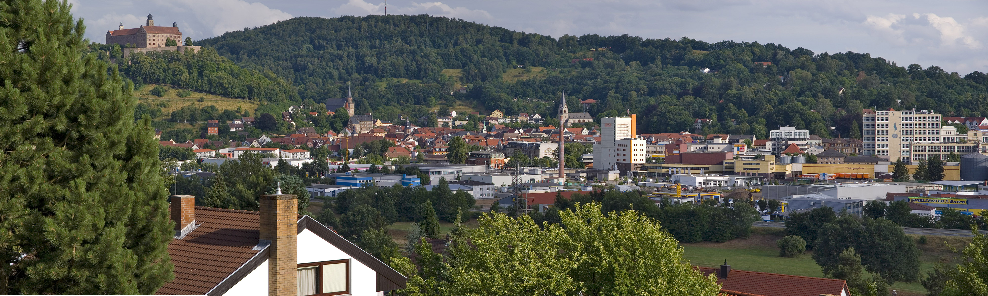 Panorama über die Stadt Kulmbach, Plassenburg und Innenstadt